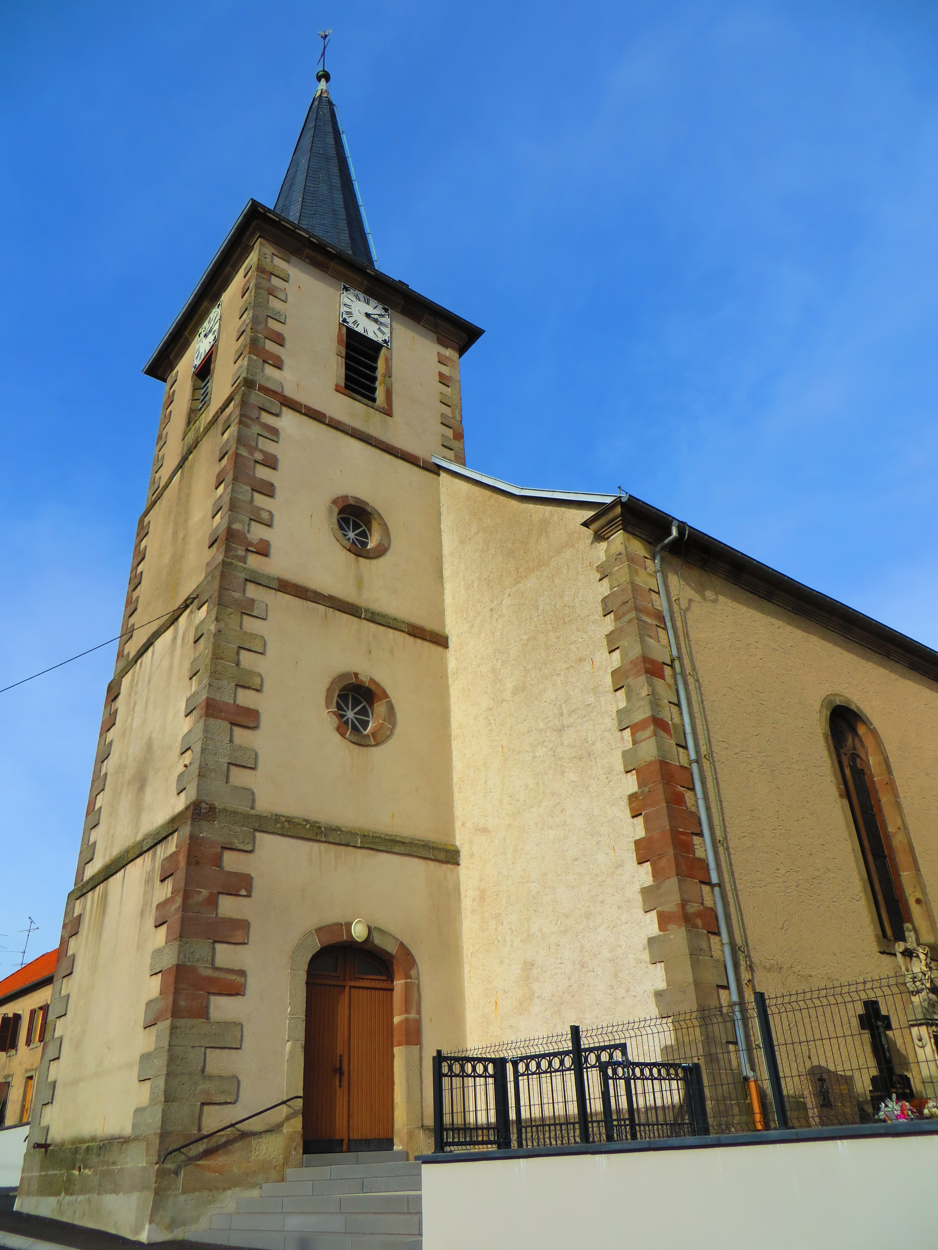 Gosselming eglise